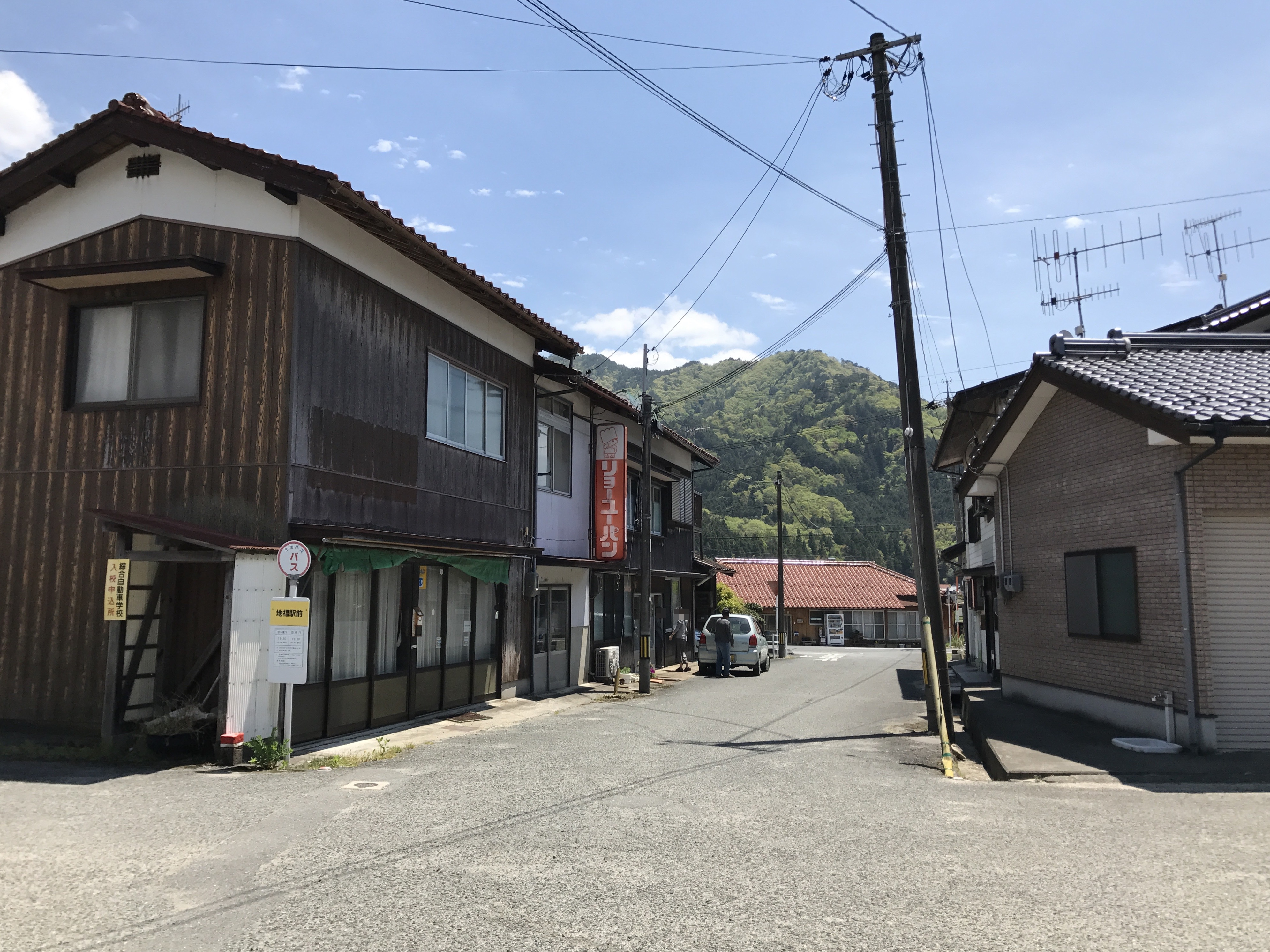 地福駅前の様子